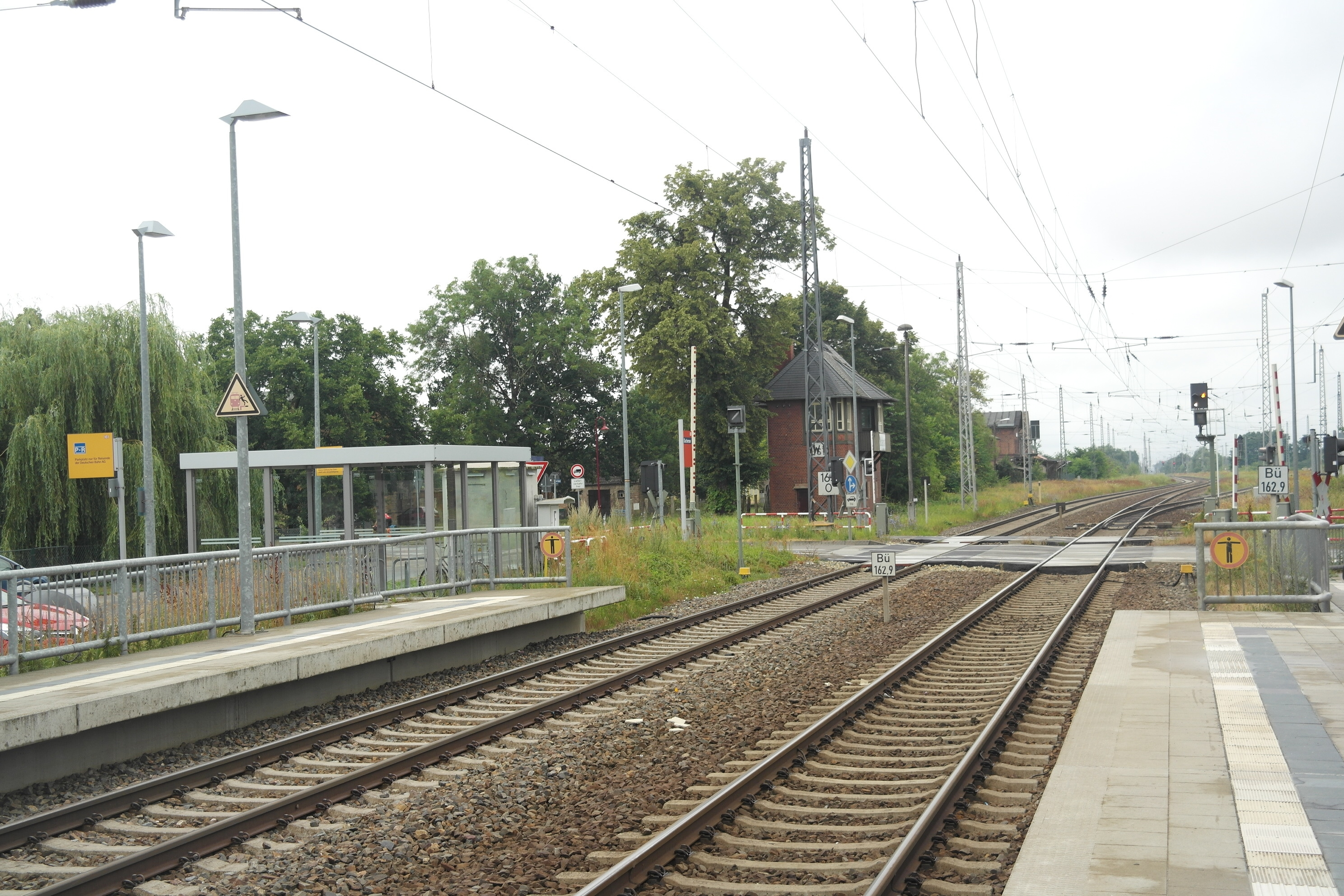 Bahnhof Ducherow, Bick von den neuen Bahnsteigen zum alten Bahnhof